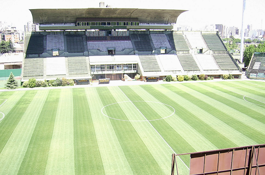 Estadio Arquitecto Ricardo Etcheverri del Club Ferro Carril Oeste